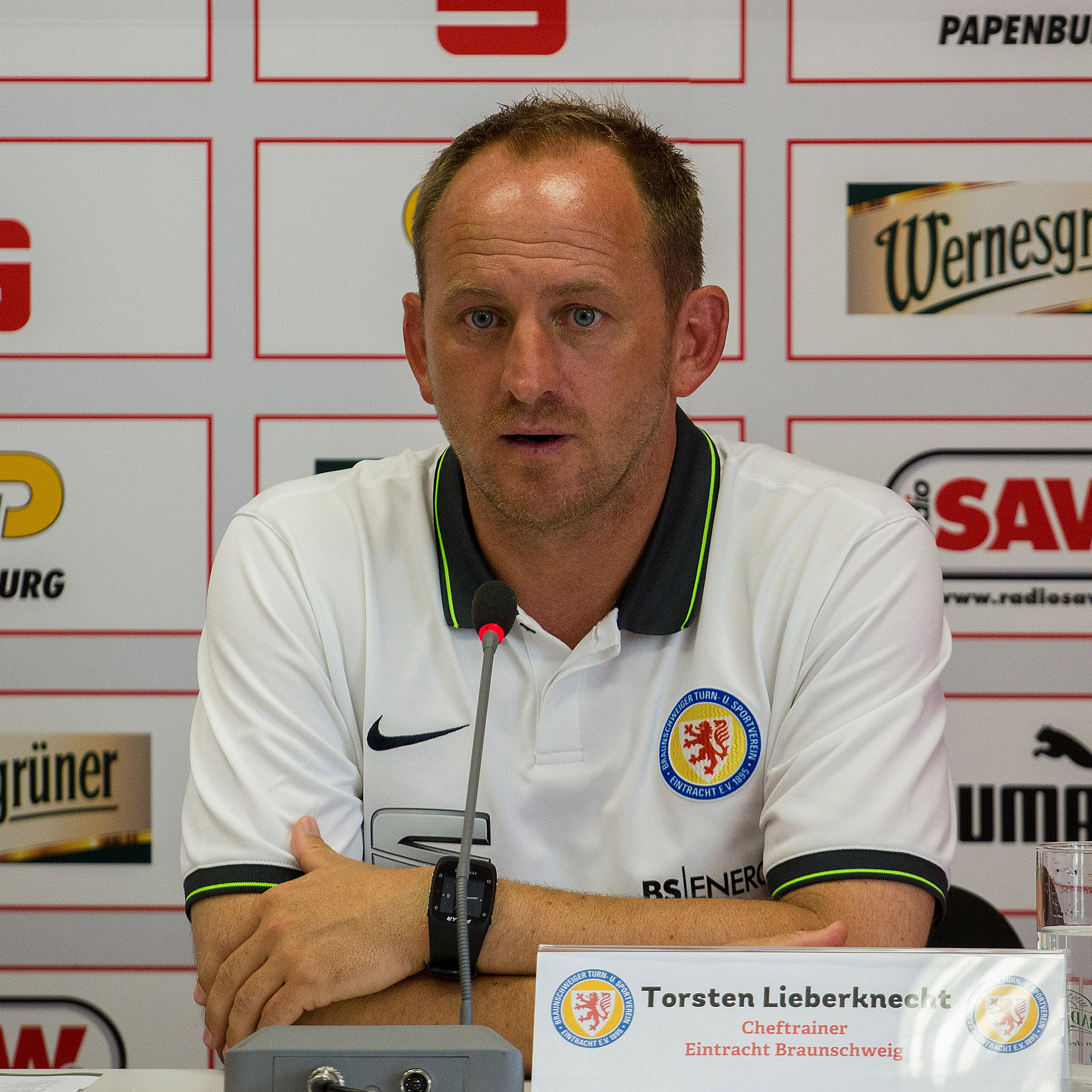 Torsten Lieberknecht DFB Pokal 2015/2016 - 1. Runde (Hallescher FC - Eintracht Braunschweig) Pressekonferenz